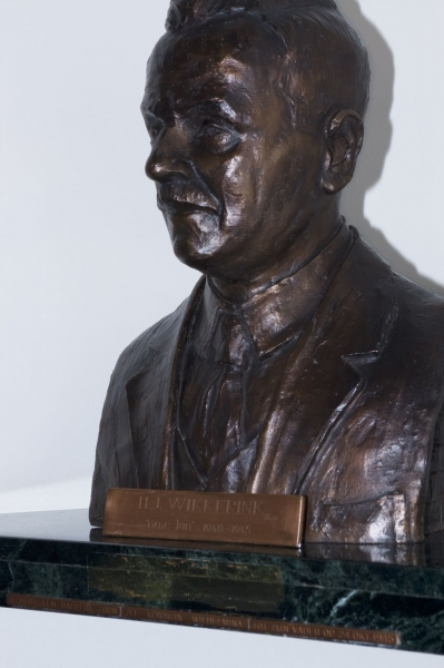 Borstbeeld van verzetsleider 'Ome' Jan Wikkerink in het Nationaal Onderduikmuseum in Aalten. Foto: Francien Wiersma-Luimes.